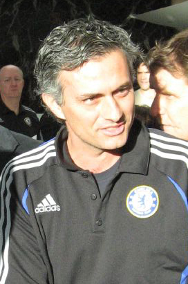 O treinador de futebol português José Mourinho.